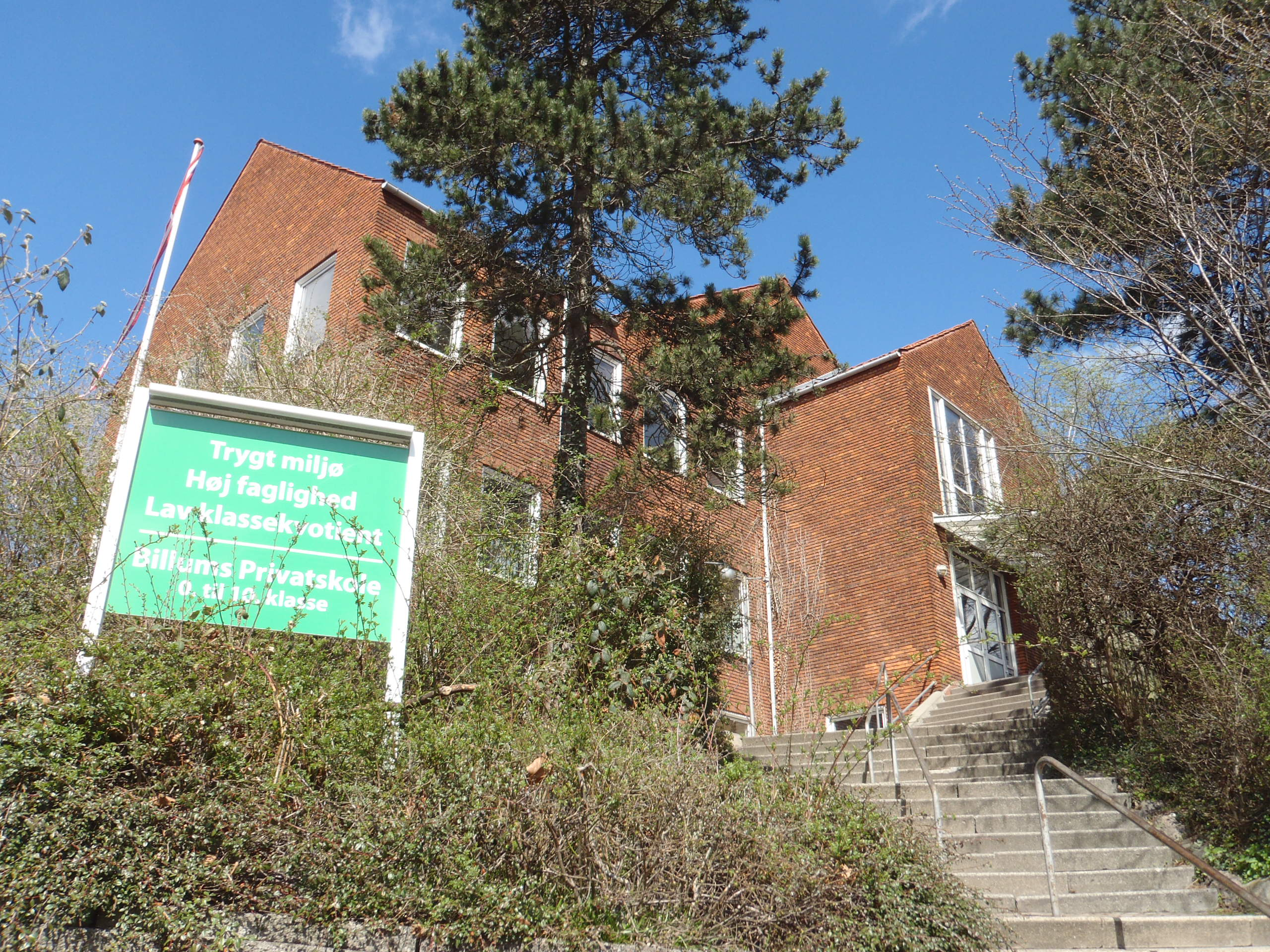 Billums Skole i Kongens Lyngby. På skilte står "Trygt miljø. Høj faglighed. Lav klassekvotient. Billums Privatskole. 0. til 10. klasse".